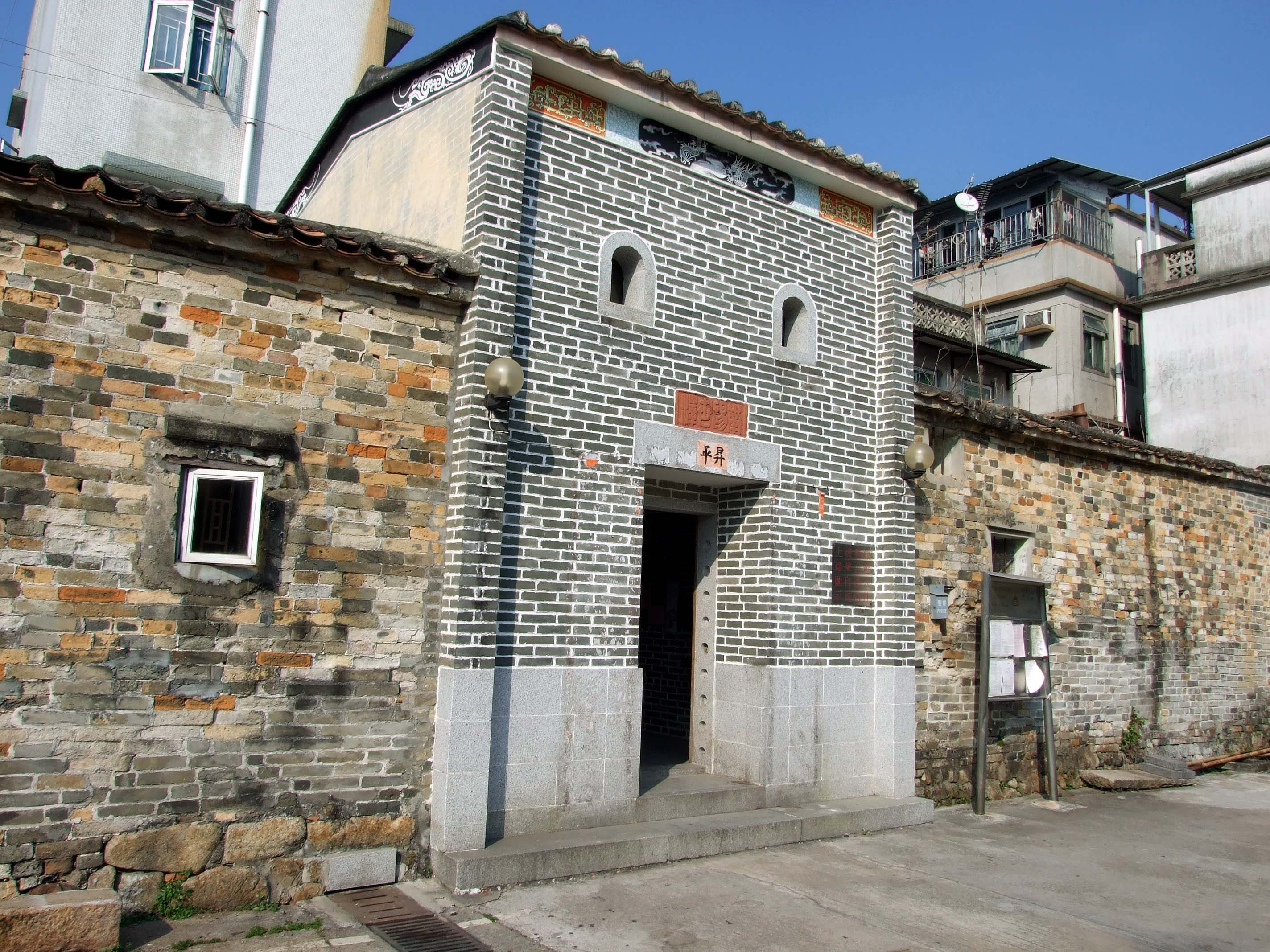 中文（香港）: 屏山上璋圍